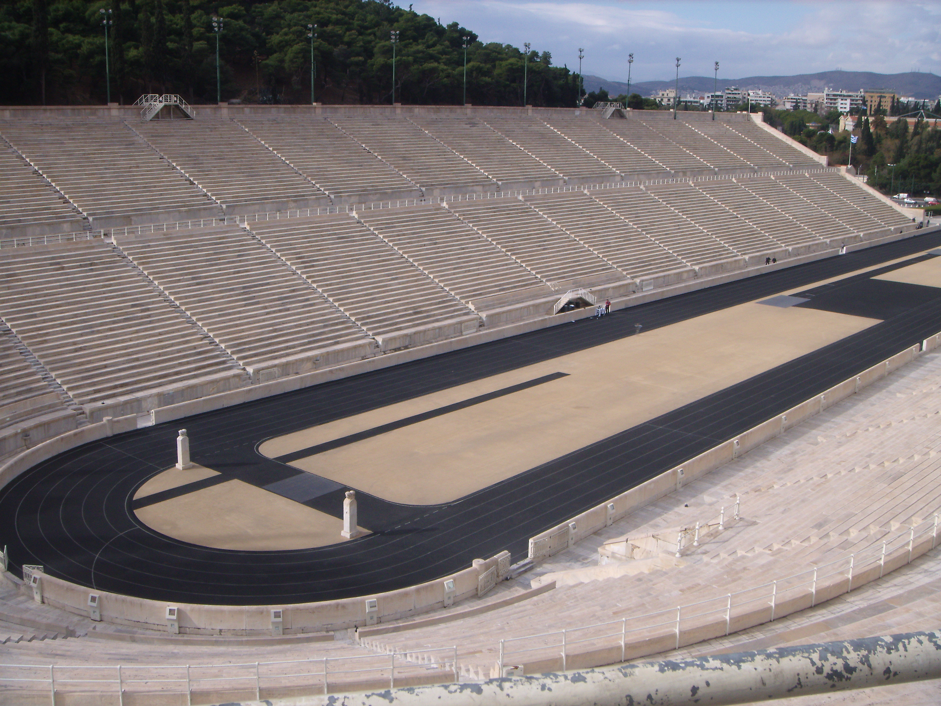 Vista del Estadio Panatenaico en Atenas.